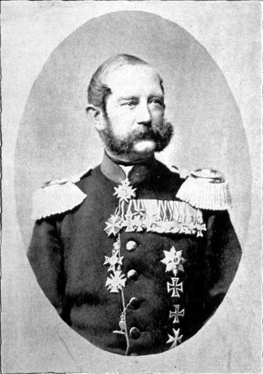 Hugo von Kottwitz, Brigadekommandeur